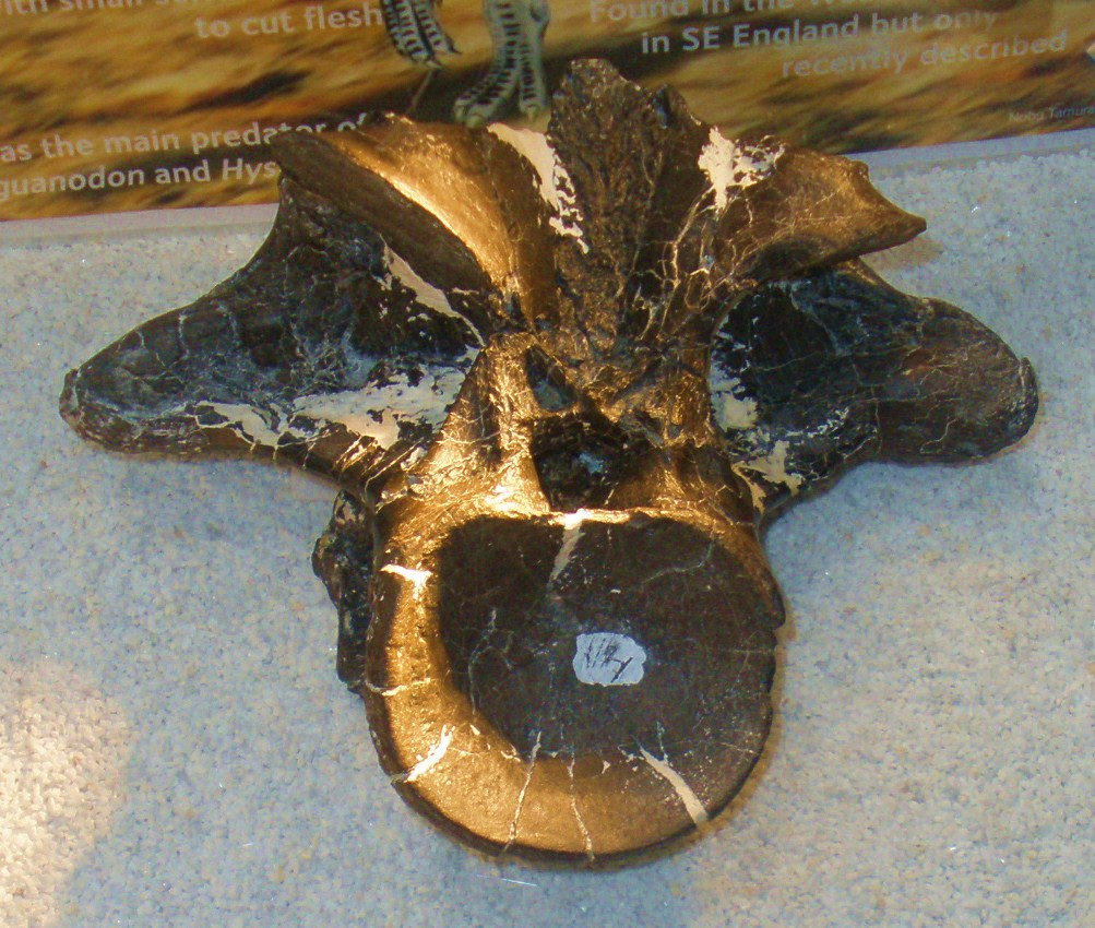 Fossil of Neovenator, an extinct theropoda- Took the photo at Fossil Show, Munich